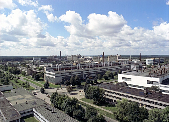 Могилевское Химволокно